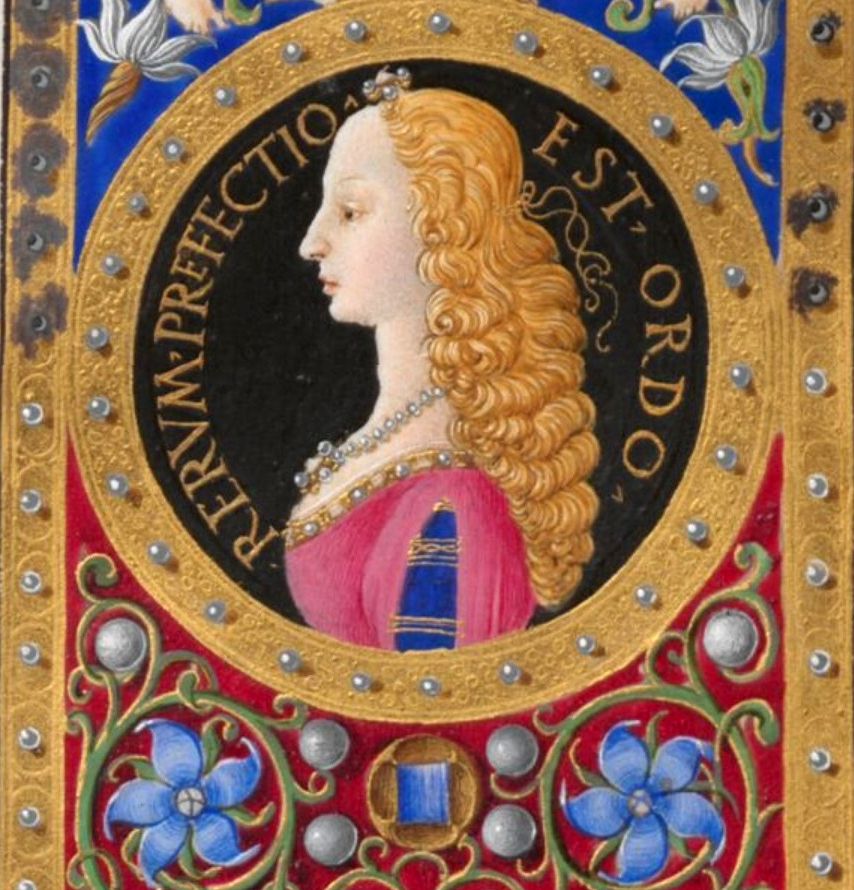 Beatrix képmása, Regiomontanus kódex - Bécs, Össterreichische National Bibliothek